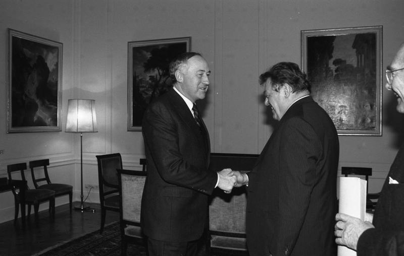 30.1.1987 Der bayerische Ministerpräsident Franz Josef Strauß empfängt den Vorsitzenden des UNO-Militärausschusses, General Wolfgang Altenburg, in der Staatskanzlei